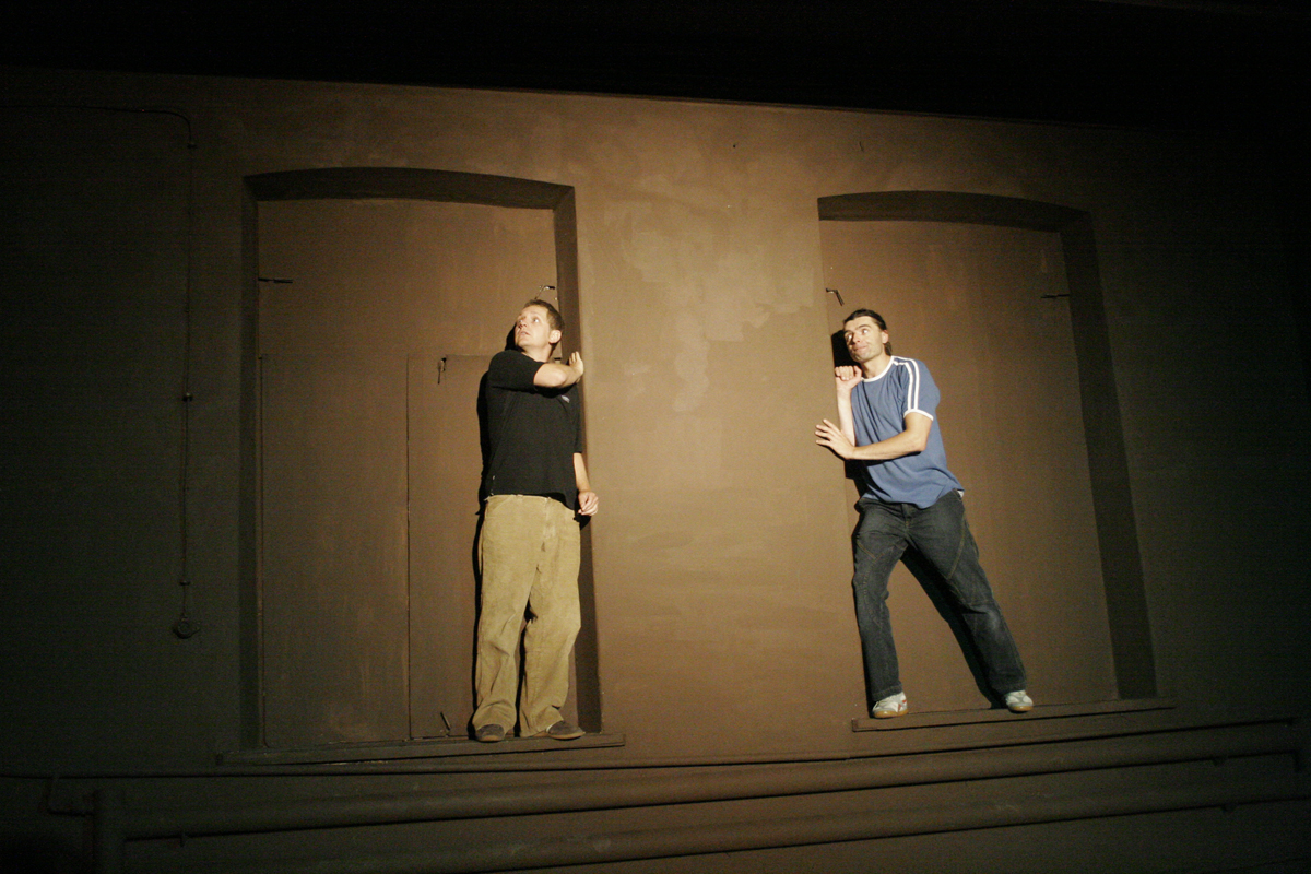 Prezentacja spektaklu "Mojo Mickybo" Teatru Krypta ze Szczecina